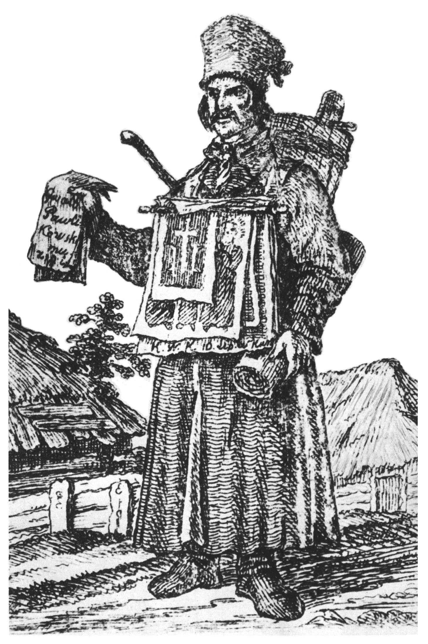 Kajetan Wincenty Kielisiński (1808-1849), Wędrowny obraźnik - "ochweśnik", kwasoryt